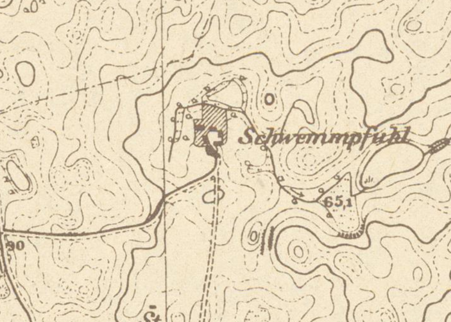 Briesen, Wohnplatz der Gemeinde Gerswalde, Lkr. Uckermark, Brandenburg, Ausschnitt aus dem Messtischblatt 2848 Gerswalde von 1882